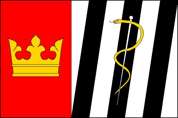 Česky: vlajka obce Paseka